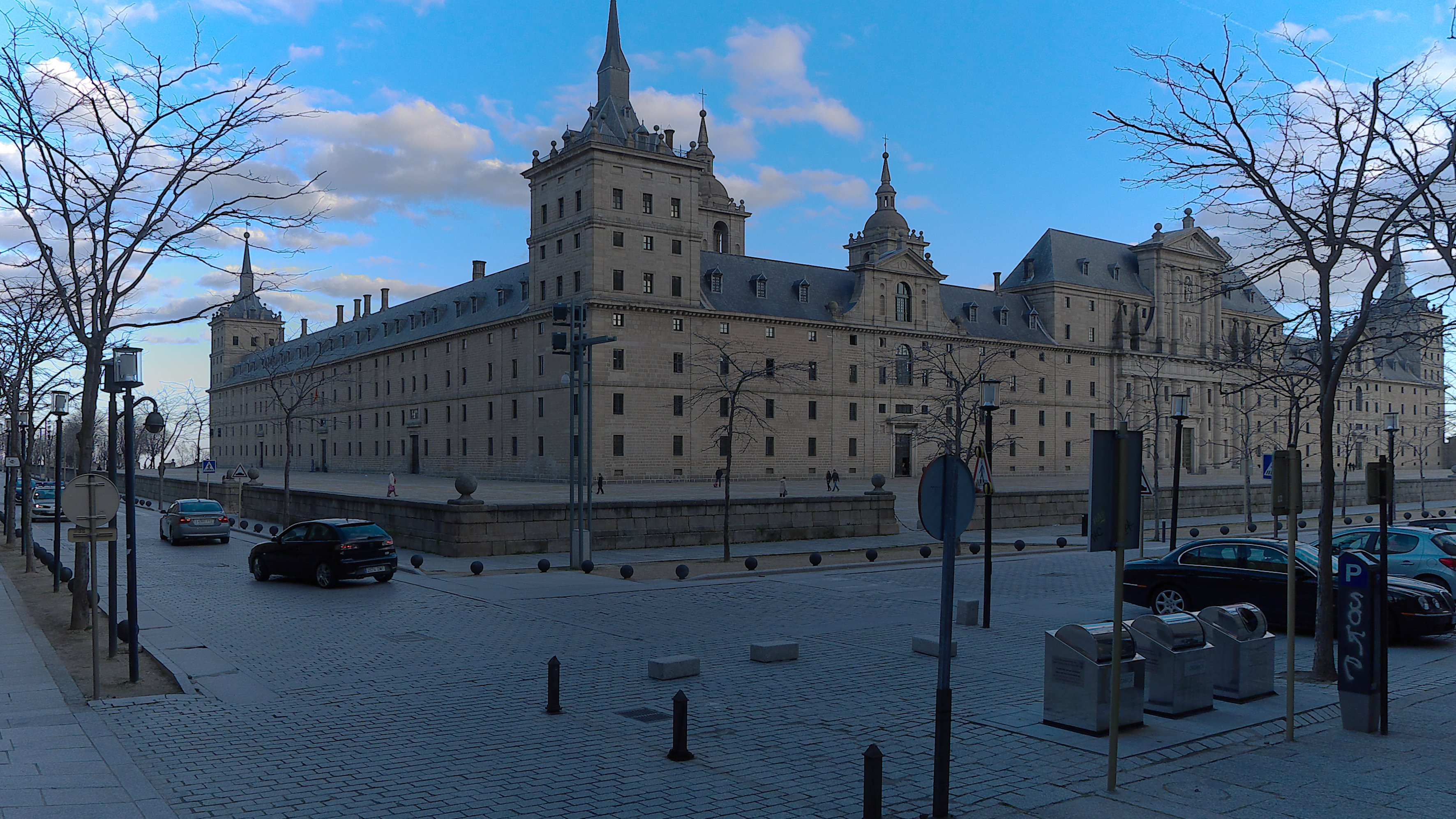 Templo, Panteón, Convento, Biblioteca, Estudio y Palacio Real: El Escorial.